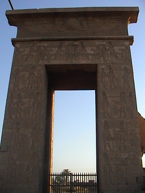 La grande porte du temple de Montou à Karnak - Dynastie ptolémaïque - août 2004